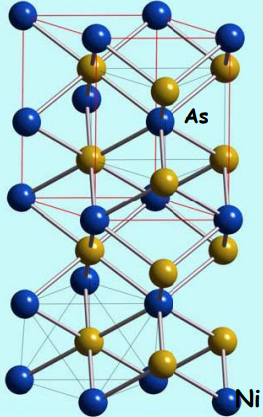 Nikel artseniuroaren egitura